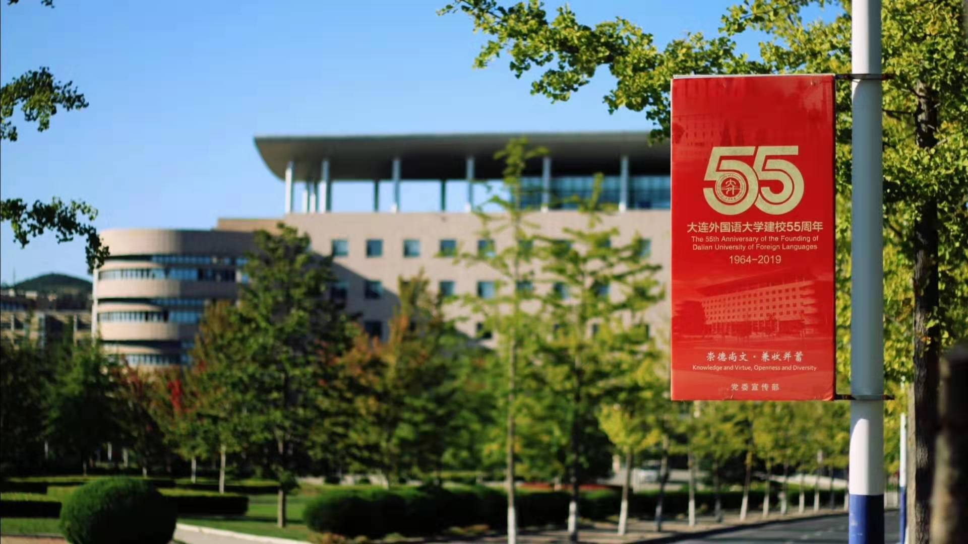 中文（中国大陆）: 大外建校50周年